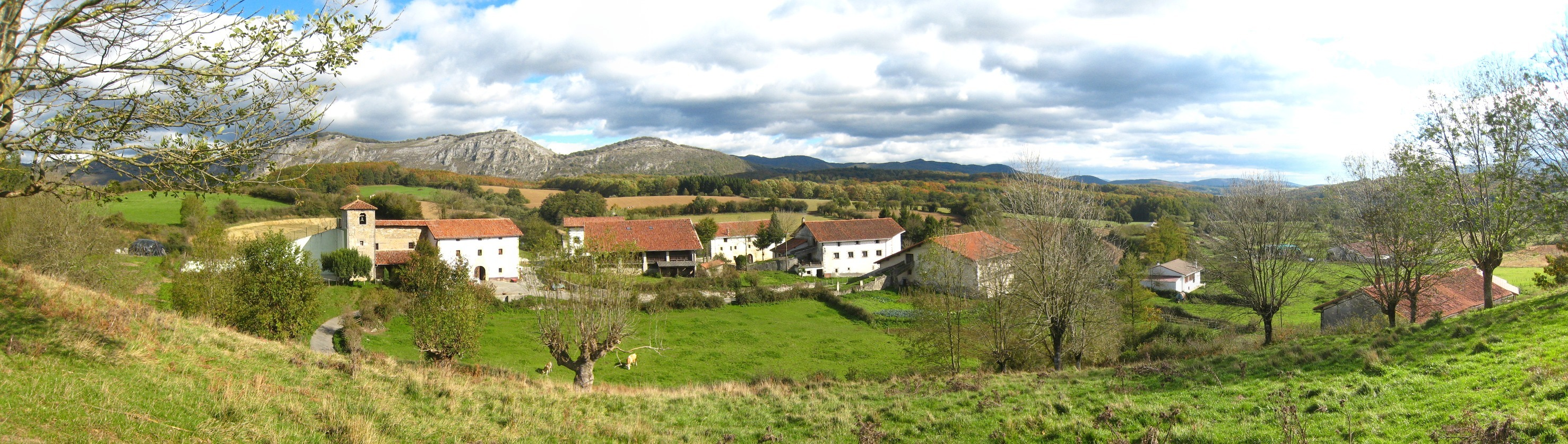 Albiasu herria